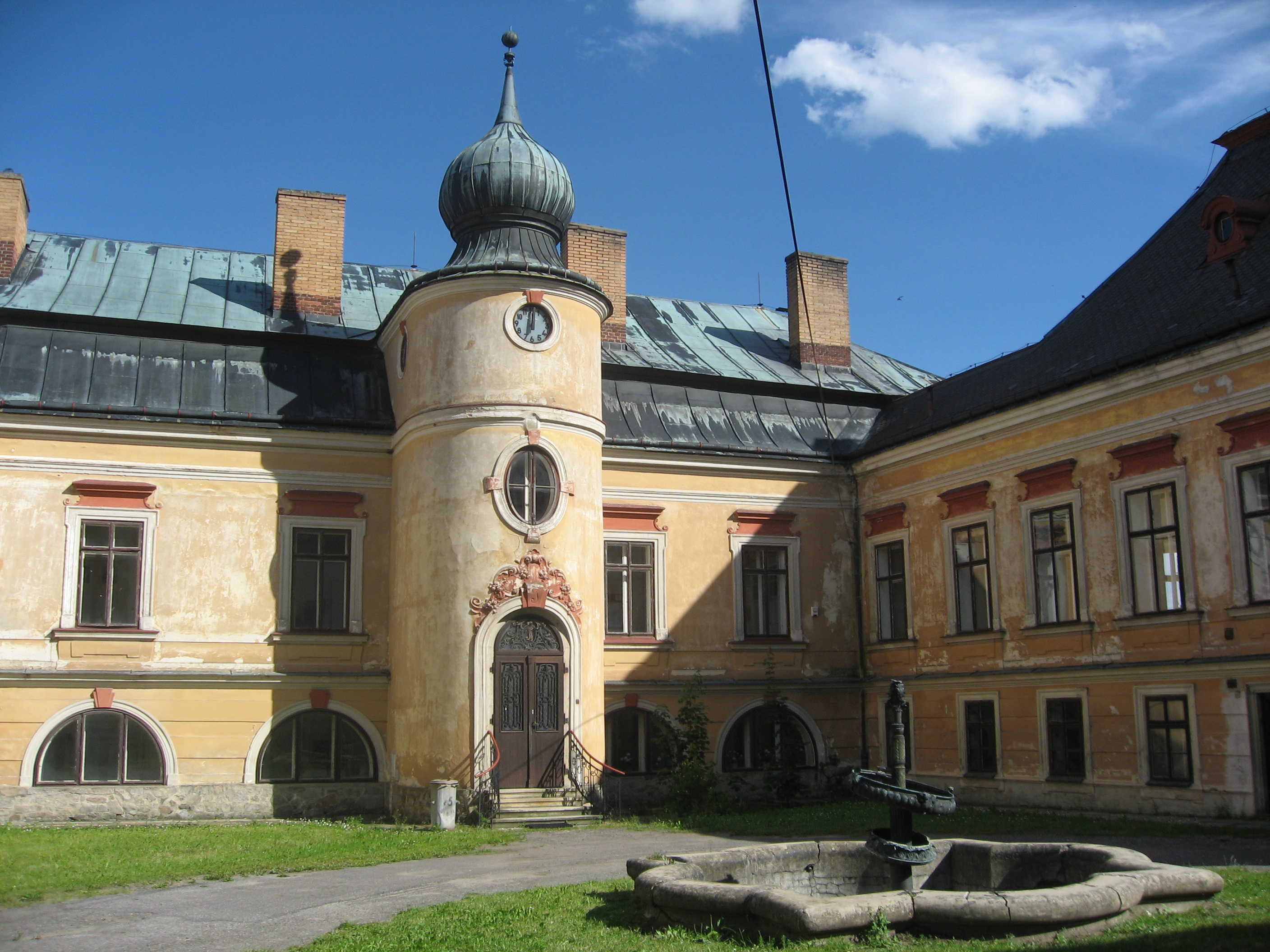 Větrný Jeníkov, zámek